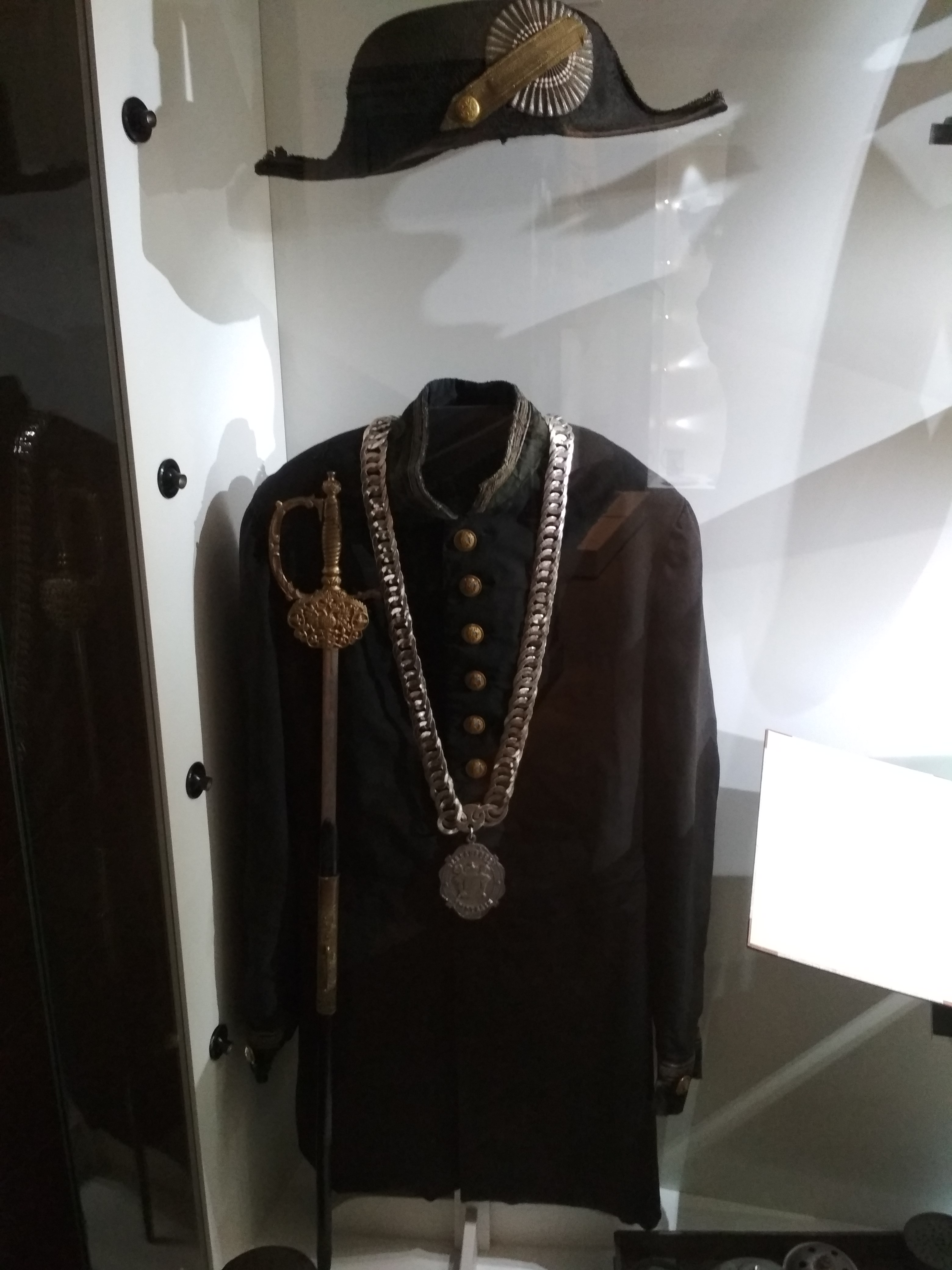 Pärnu raehärra ametikostüüm ja -kübar 19. sajandi keskpaigast (Pärnu muuseum)